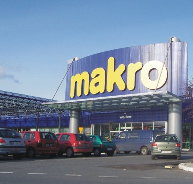 Hypermarket Makro v Krakově